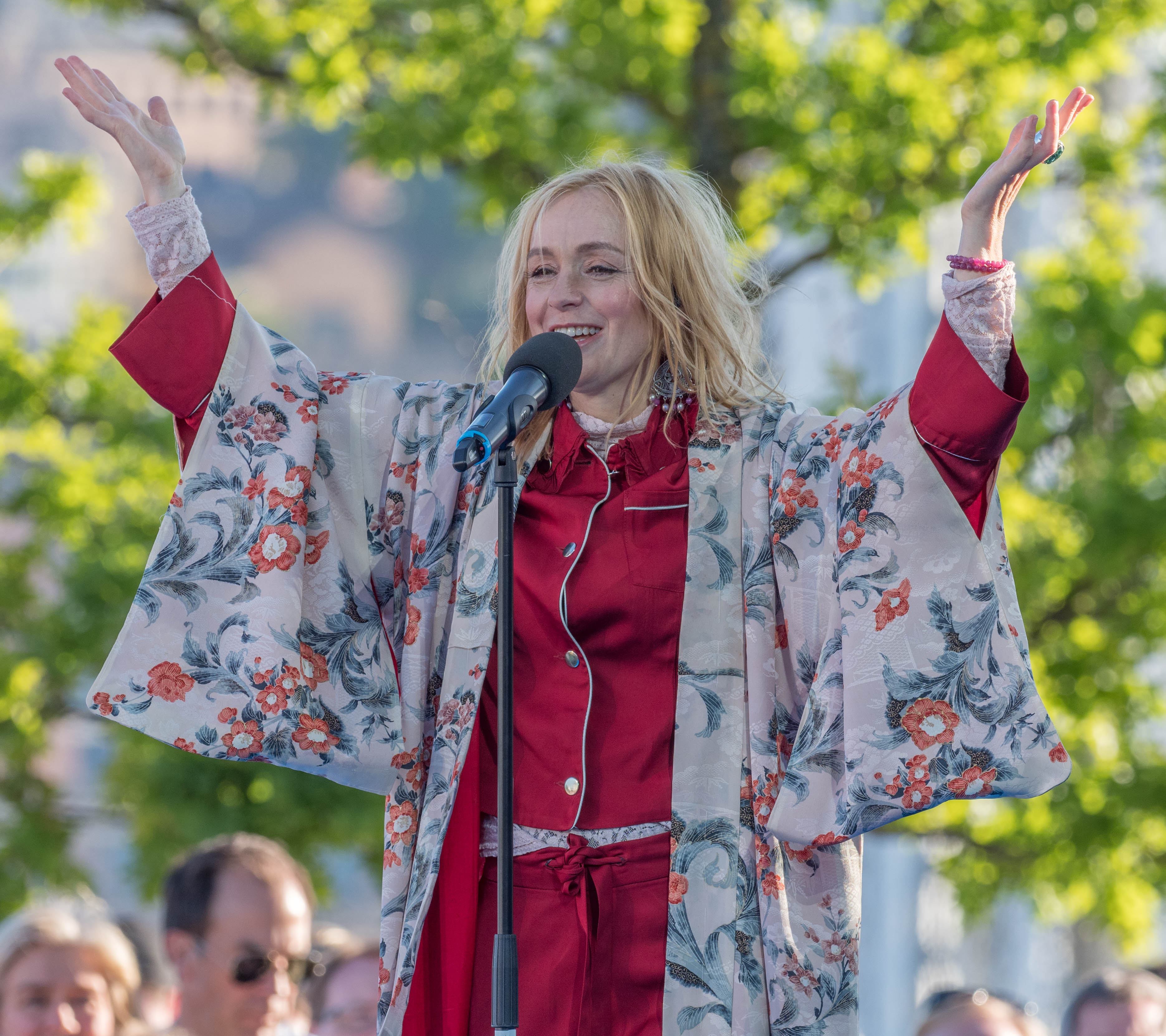 Lisa Ekdahl